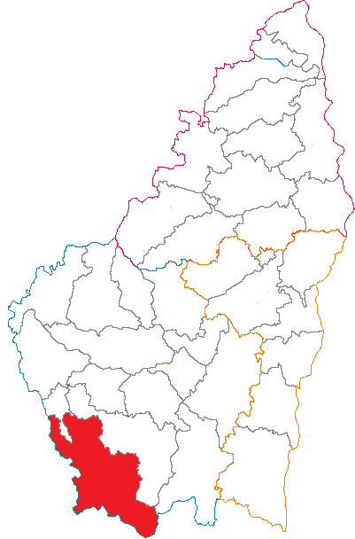 Situation du canton dans le département de l'Ardèche (France)